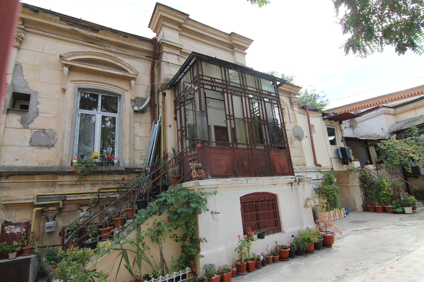 Casă pe Stelea Spătarul